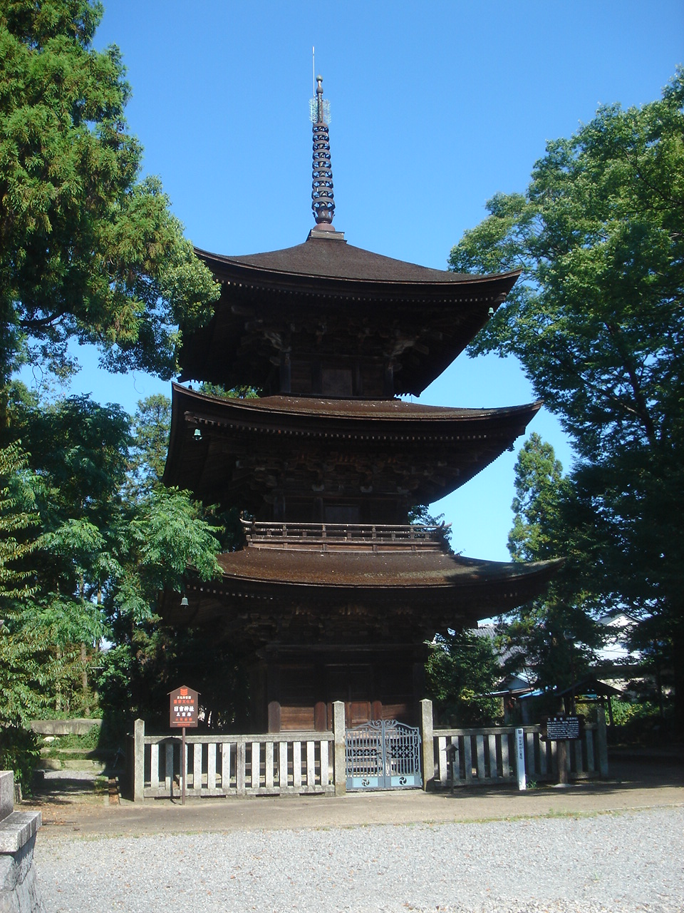 Hiyoshi Jinjya(Shrine)(日吉神社の三重塔),Godo,Gifu,Japan(岐阜県神戸町)で撮影。